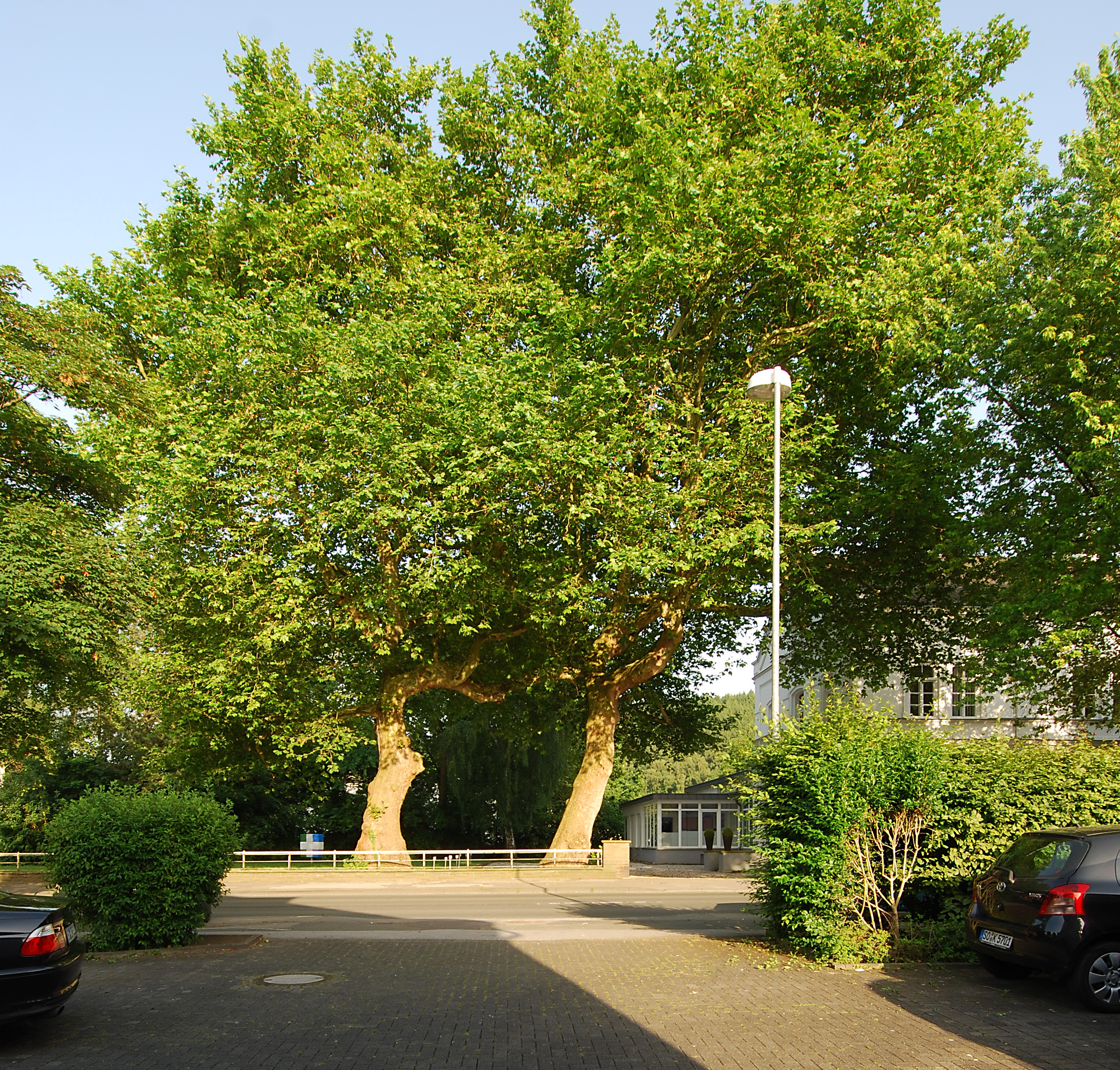 Auf dem Grundstück, auf dem die beiden Platanen stehen wurde das denkmalgeschützte Profangebäude Weiße Villa erbaut. Die zwei Platanen sind zusammen als geschützter Landschaftsbestandteil ausgewiesen. Koordinaten des Standortes: N 051° 29.421' O 007° 51.954'